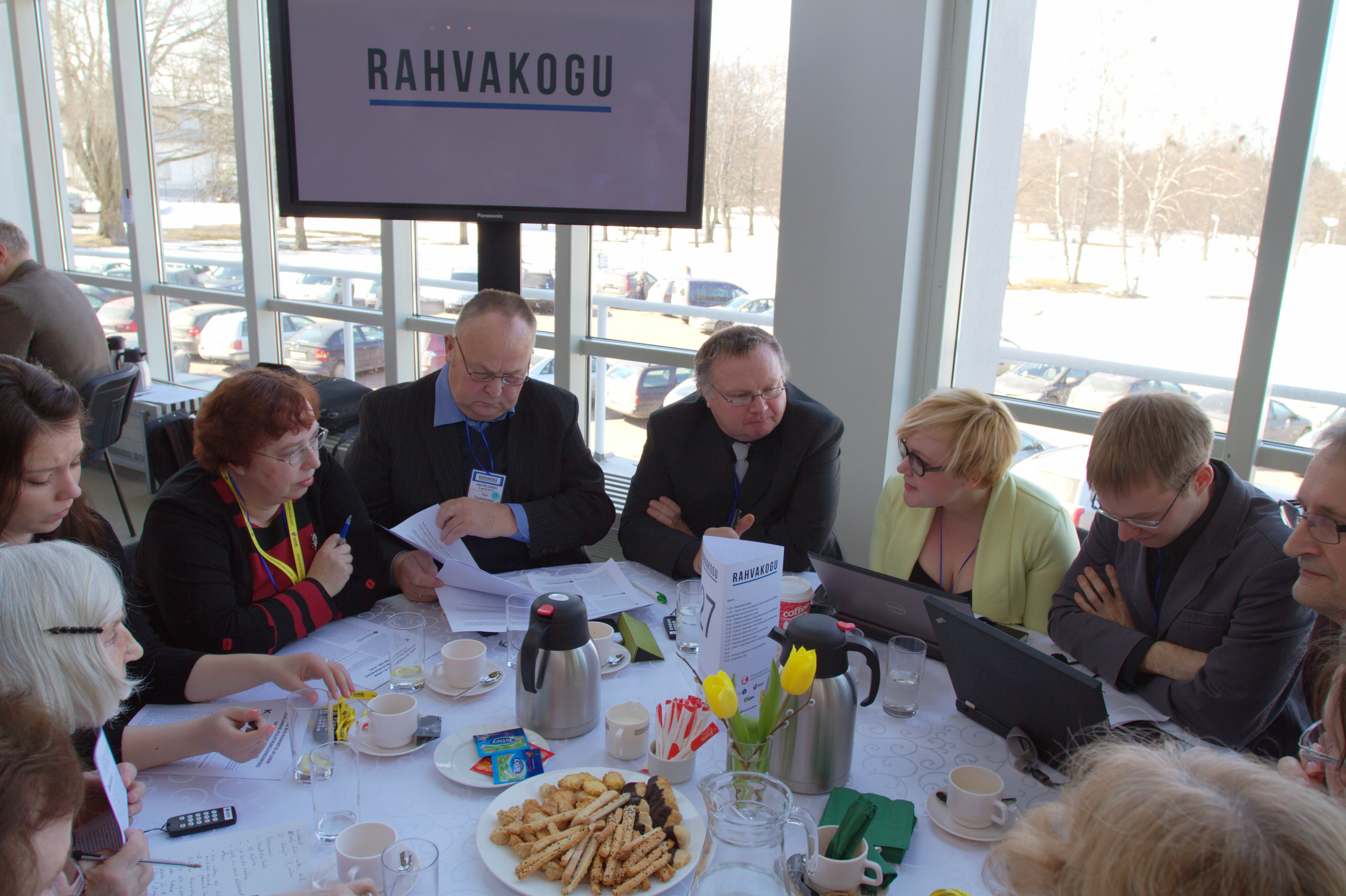 Rahvakogu arutelupäev 6. aprillil 2013 Tallinna lauluväljakul.